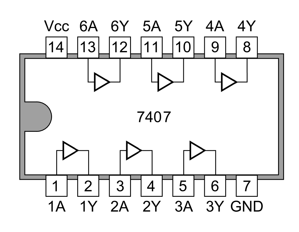 7407 ic 腳位圖